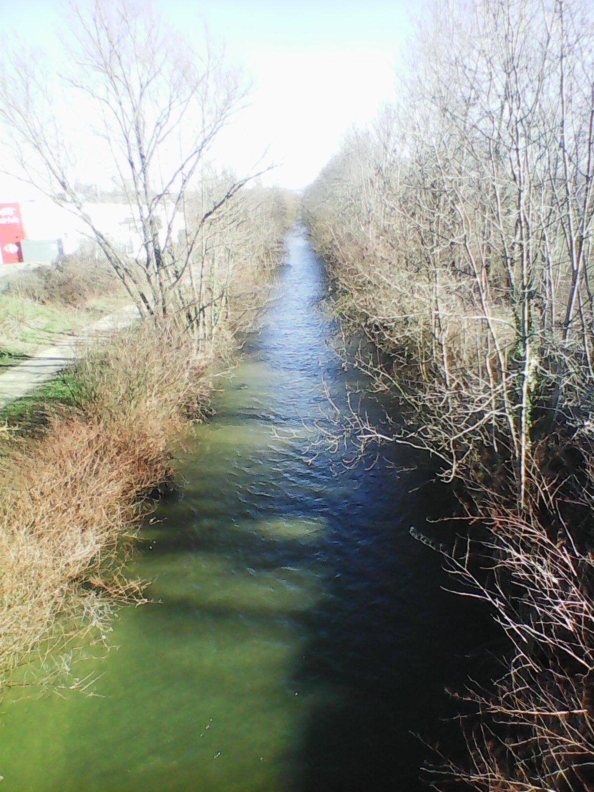 Canal de la Bourbre à L'Isle d'Abeau dans le secteur des Ayes le 16 février 2019